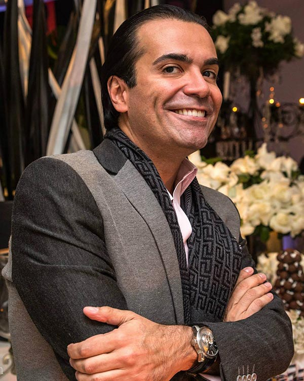 Fabio Arruda - consultor de etiqueta